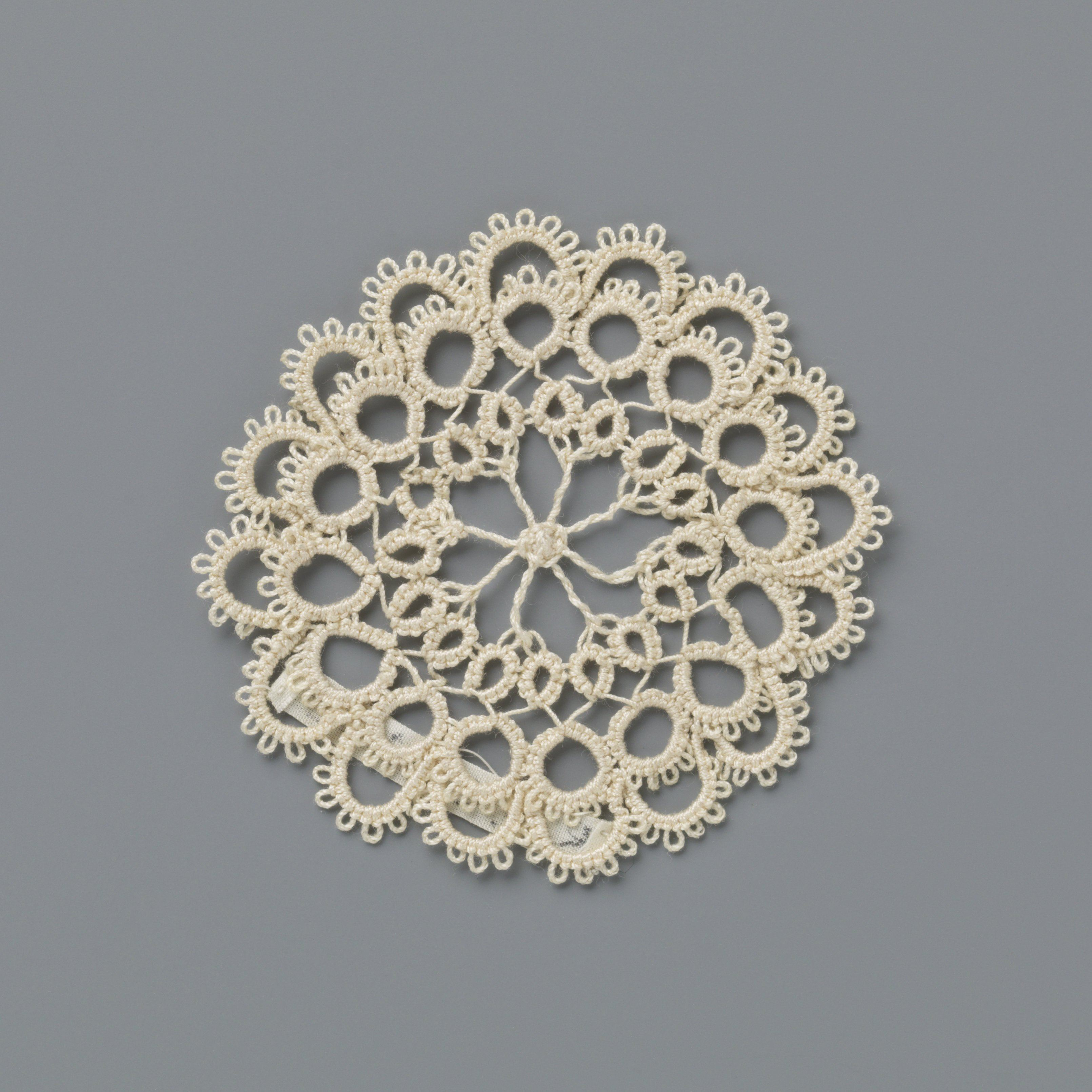 IdentificatieTitel(s): Strook geknoopte kant met twee rijen lussenObjecttype: strook Objectnummer: BK-15289-BOmschrijving: Strook naturelkleurige geknoopte kant: frivolité. Twee rijen lusjes. Aan de boven- en onderzijde zit aan elk lusje een picot.VervaardigingVervaardiger: kantwerkster: anoniemPlaats vervaardiging: EuropaDatering: ca. 1900Fysieke kenmerken: geknoopte kantMateriaal: linnen Techniek: geknoopte kant / knoopwerk / frivolitéAfmetingen: l 22 cm. × b 1,2 cm. Verwerving en rechtenCredit line: Schenking van M. Waldeck-Reiss, AmsterdamVerwerving: schenking 1939Copyright: Publiek domein